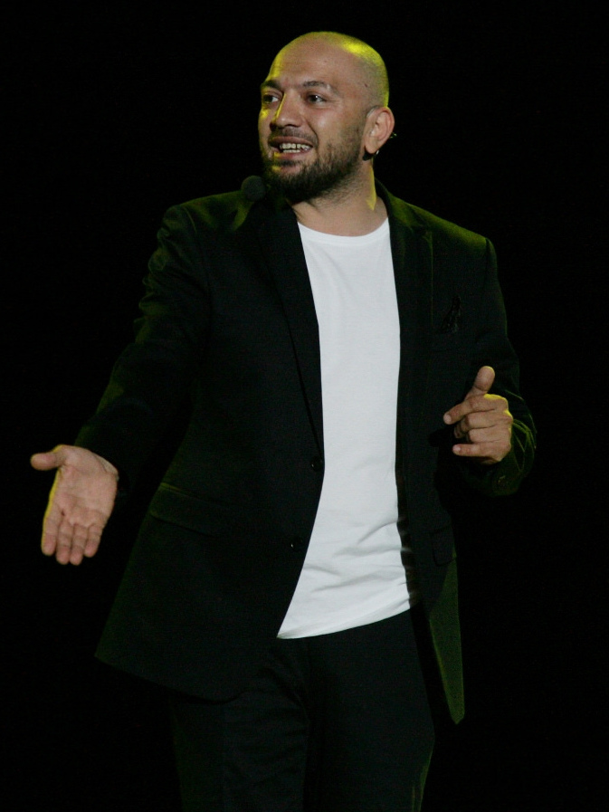 Ceyhun Yılmaz